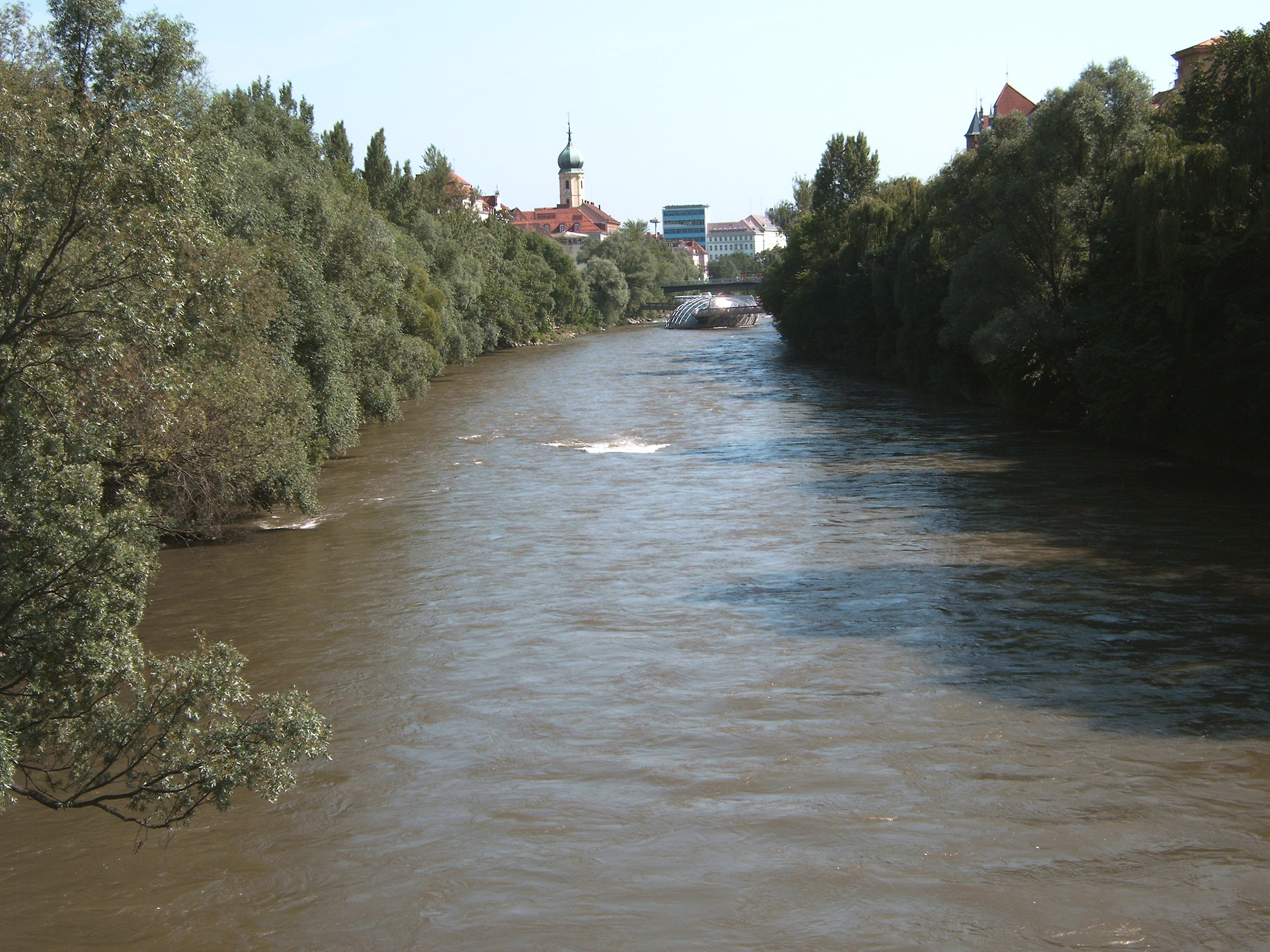 Murinsel bei Graz, Juni 2006.